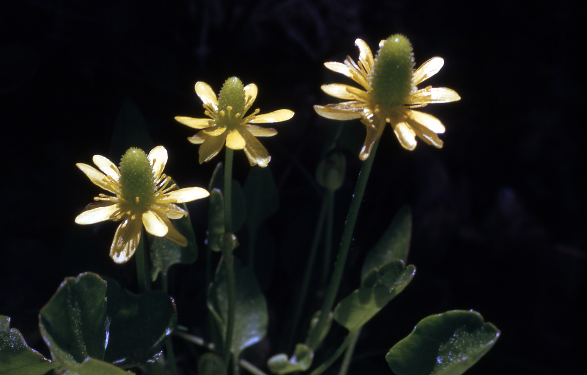 Ranunculus cymbalaria